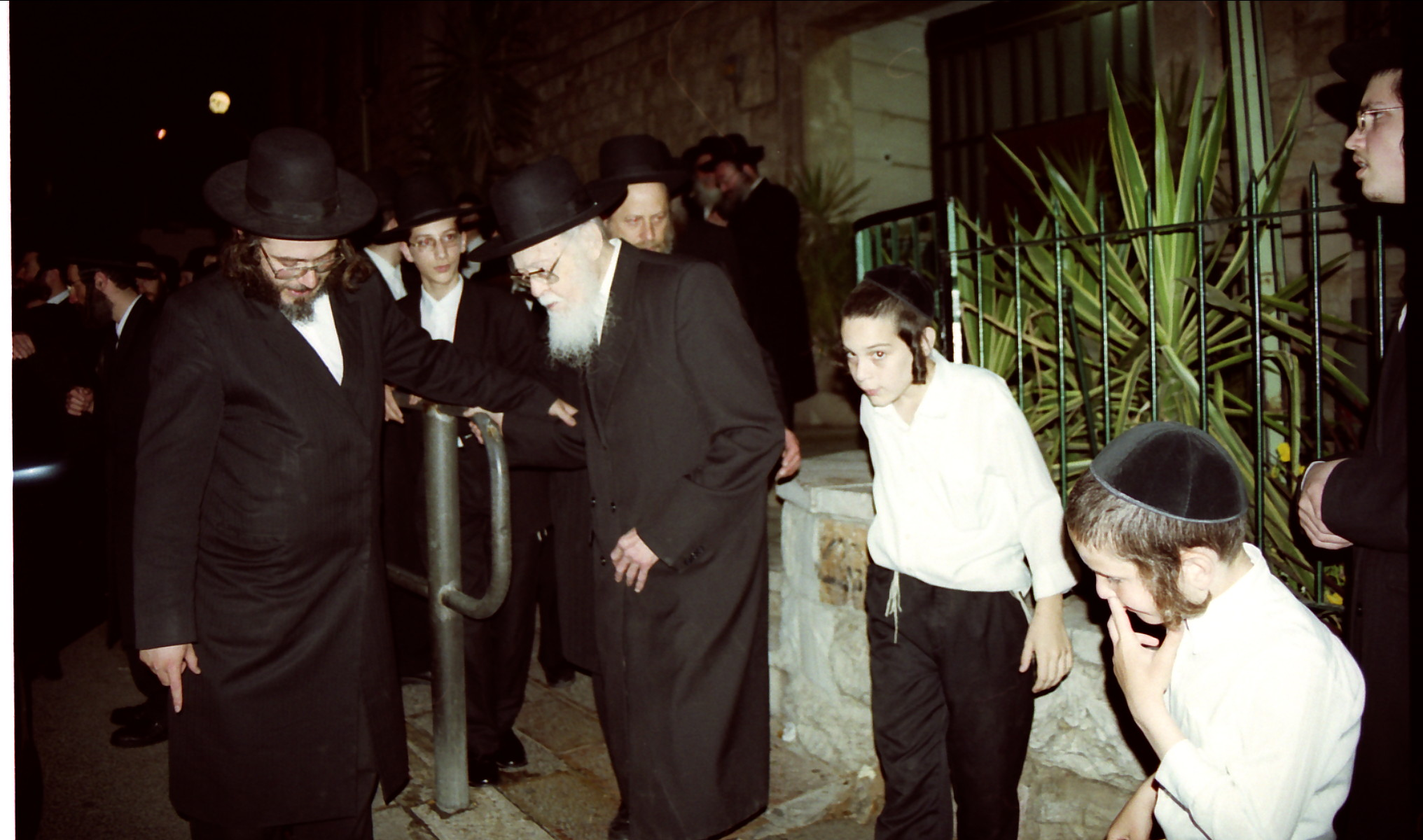 שבע ברכות לנינתו בירושלים